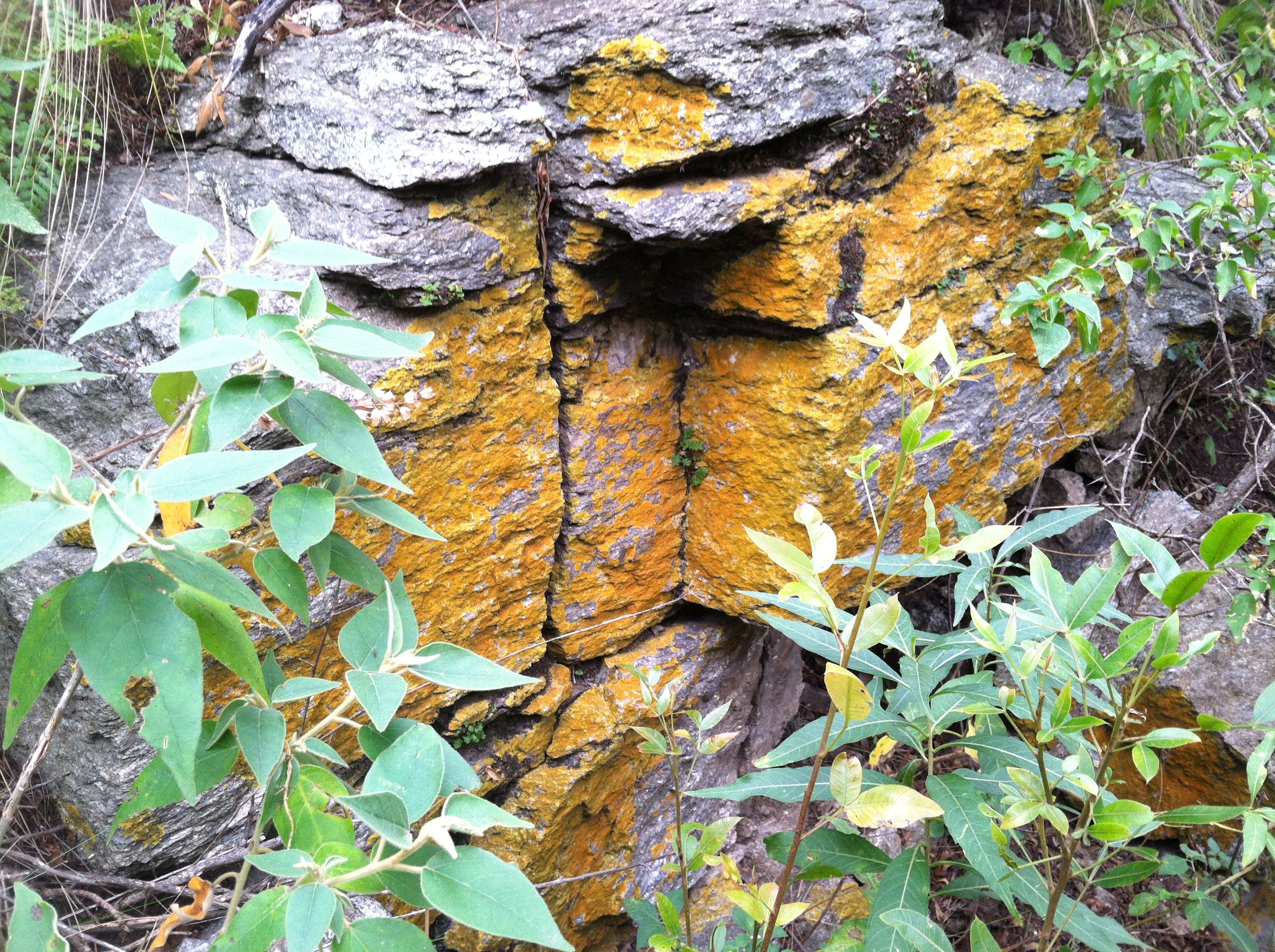 Reserva Mogote Bayo